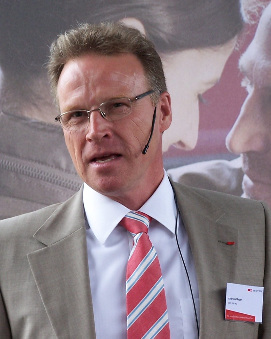 Andreas Meyer beim 150 jährigen Jubiläum der SBB in Freiburg.